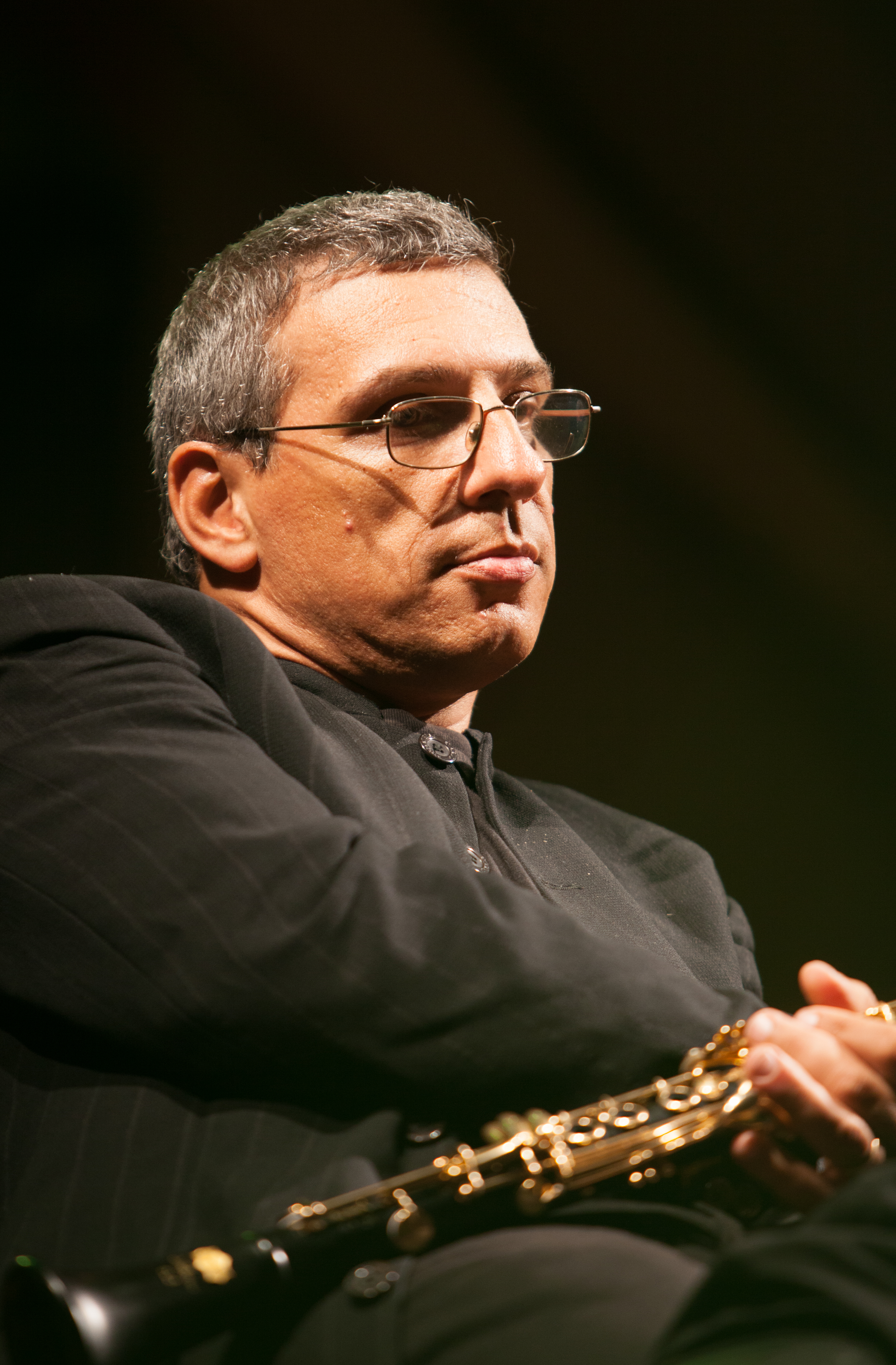 Il Clarinettista Gabriele Mirabassi in Rudolstadt 2013 Der Klarinettist Gabriele Mirabassi beim TFF Rudolstadt 2013